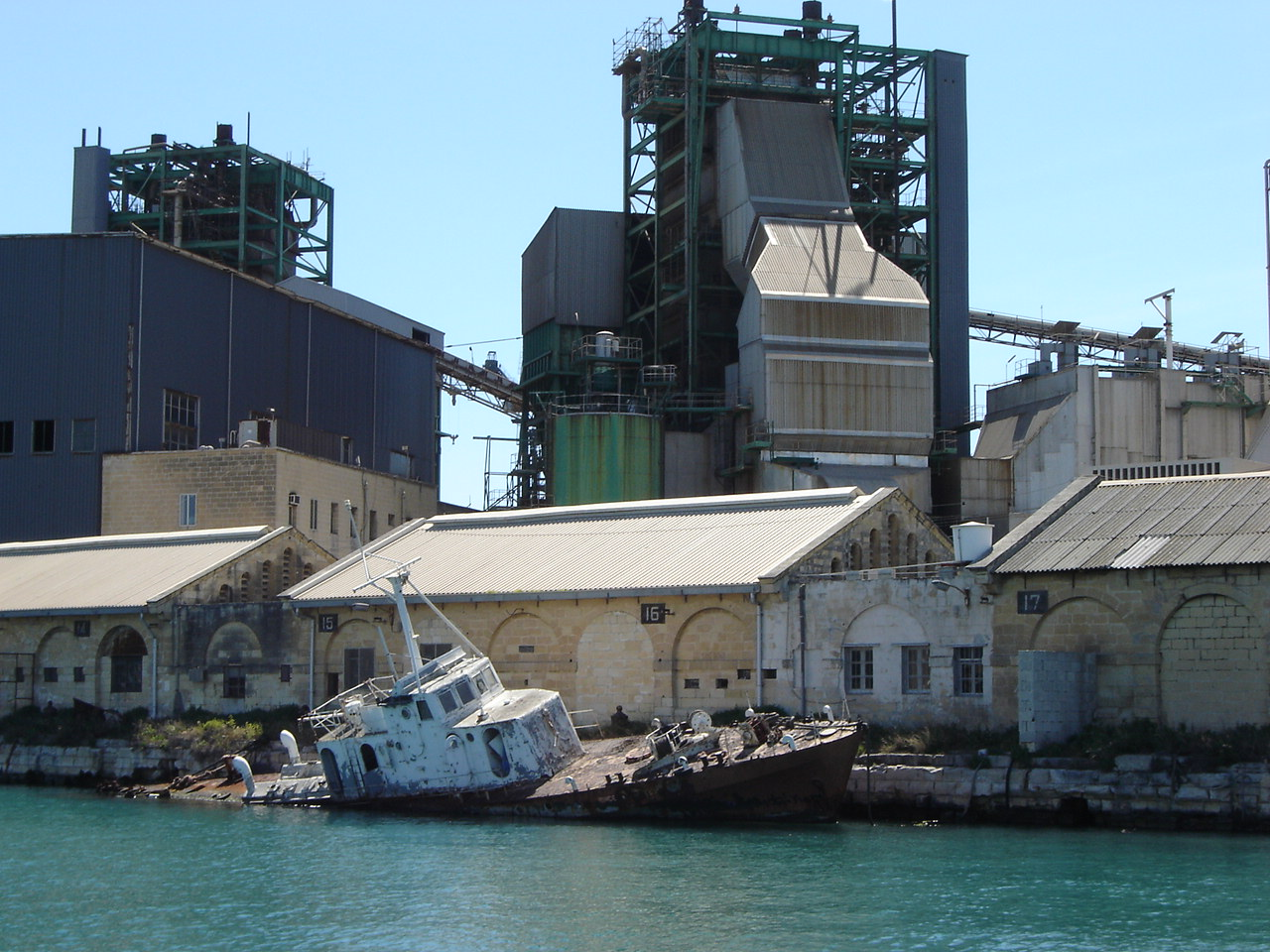 Boote und marine Anlagen, Zubehör und Details. Malta, April 2006. Halb abgewrackter Zollkreuzer im Hafen von Malta.